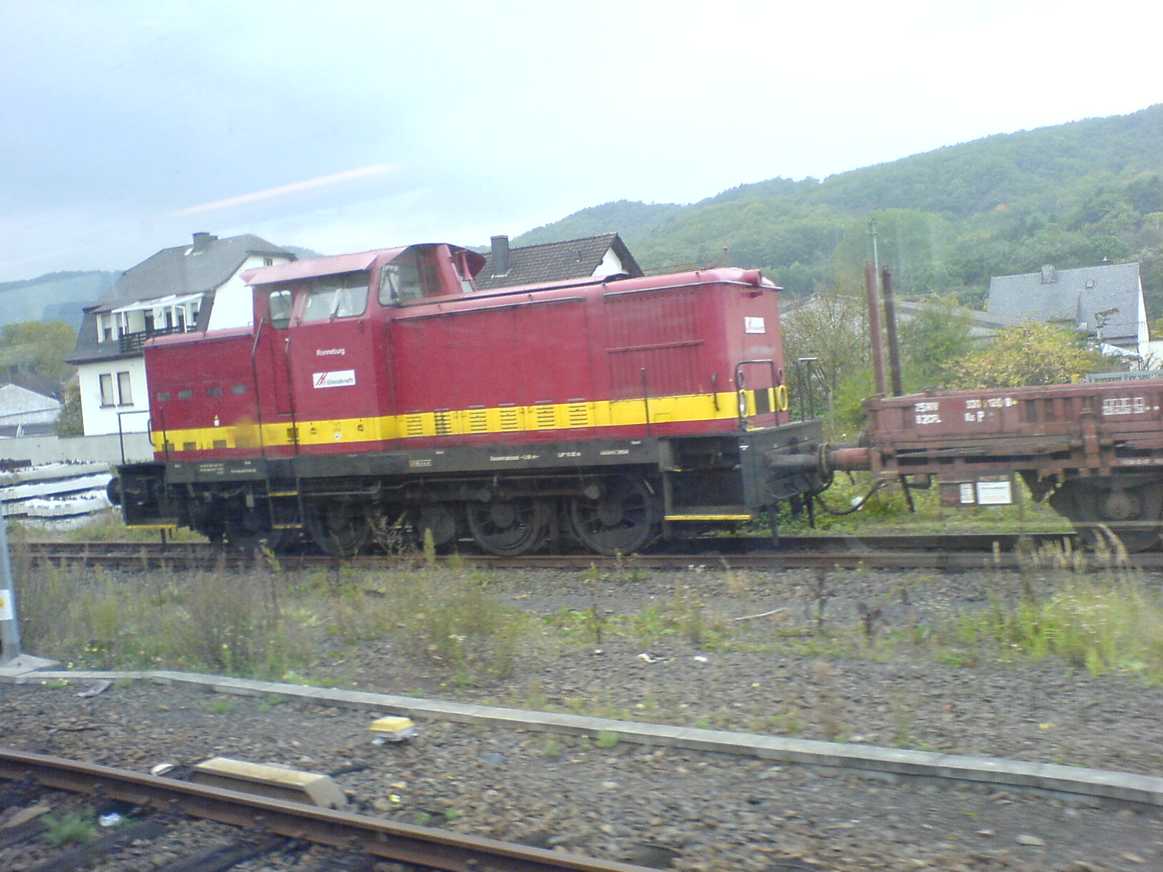 105 972 „Ronneburg“ der Gleiskraft GmbH im Bahnhof Fischbach-Weierbach an der Kursbuchstrecke 680 (Nahetalbahn). Entgegen der Loknummer war die Lok nie bei der DR im Einsatz